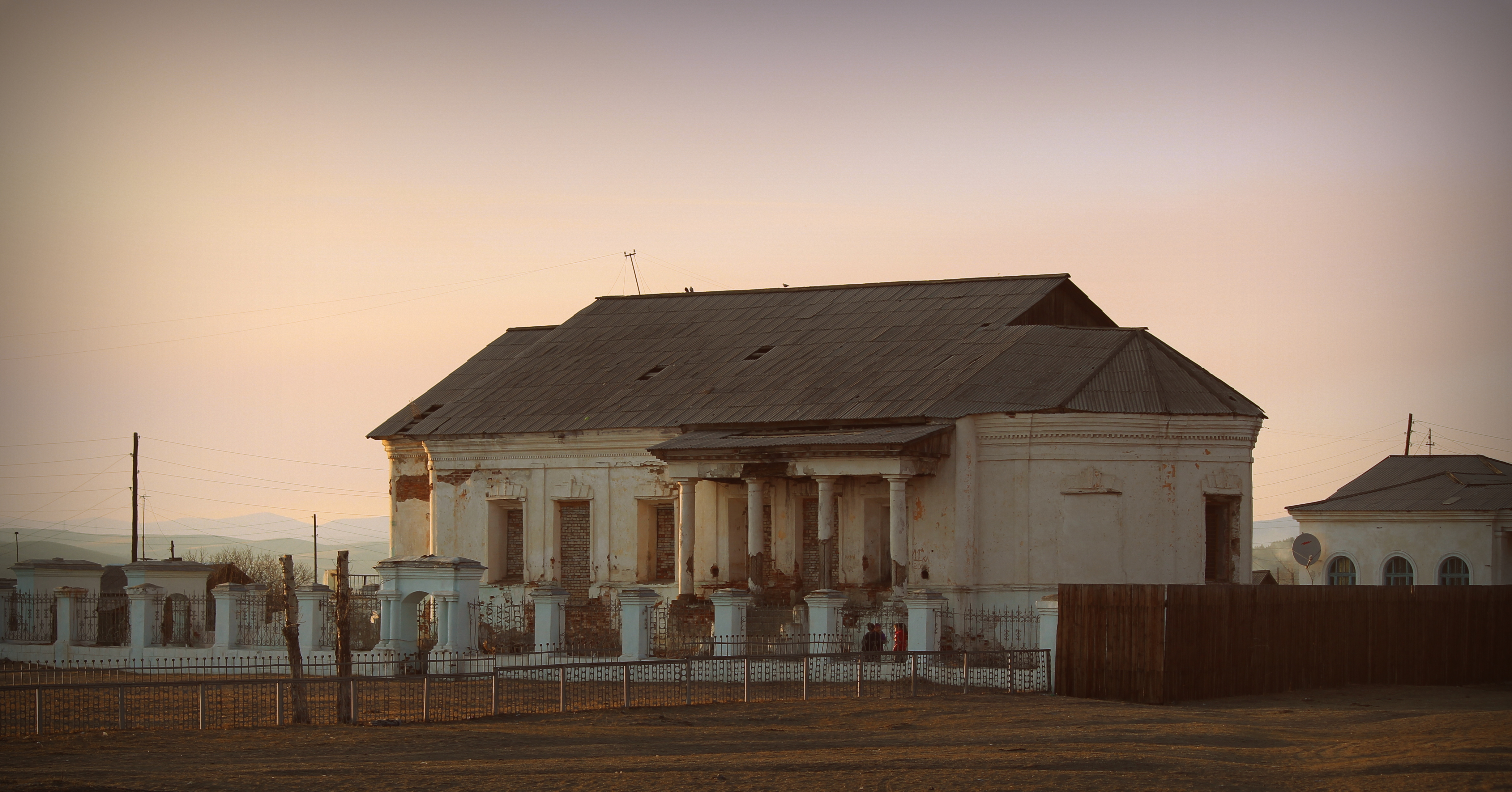 Богородице-Тихвинская церковь в Усть-Кяхте